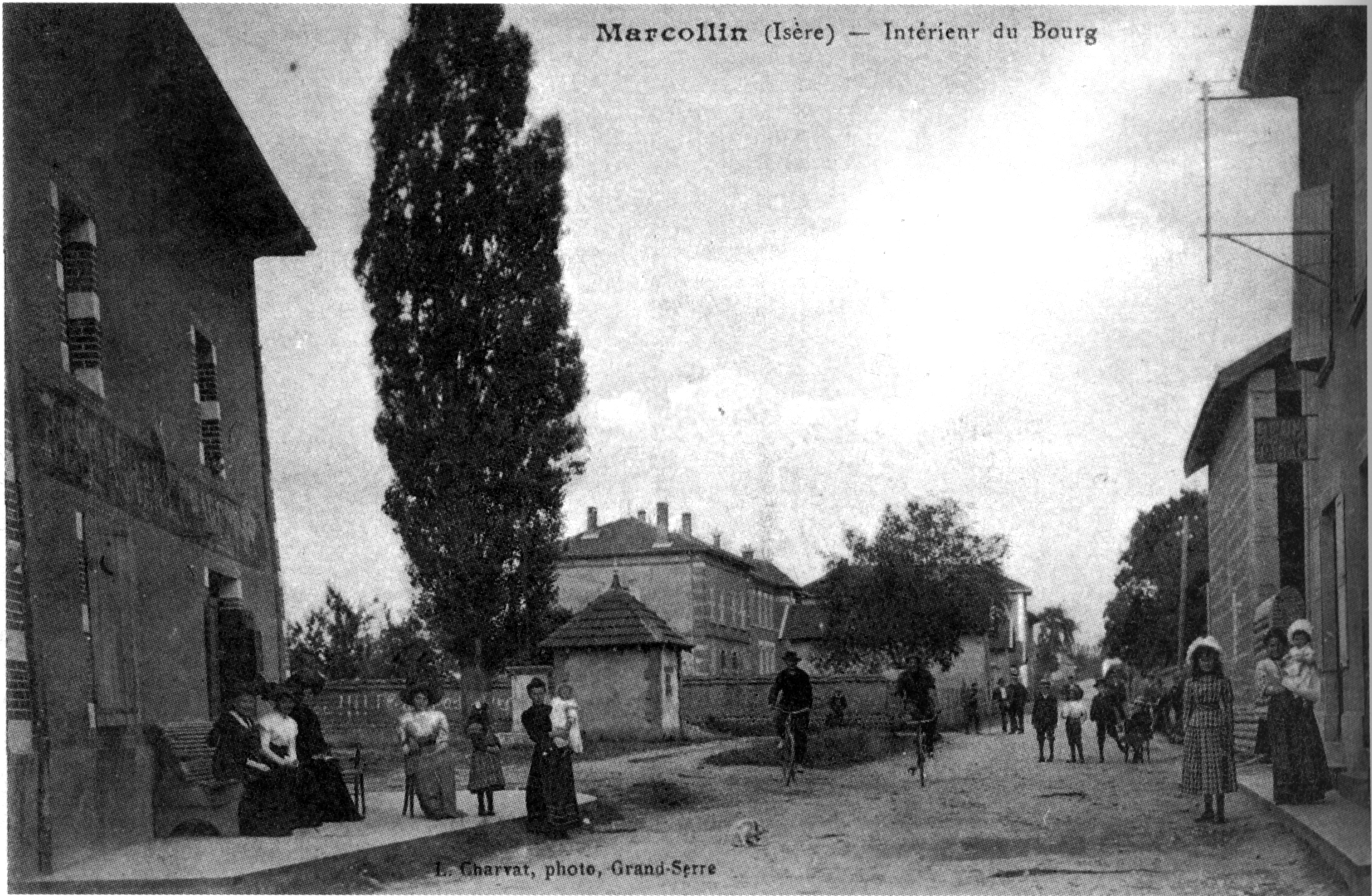 Marcollin, intérieur du bourg en 1910